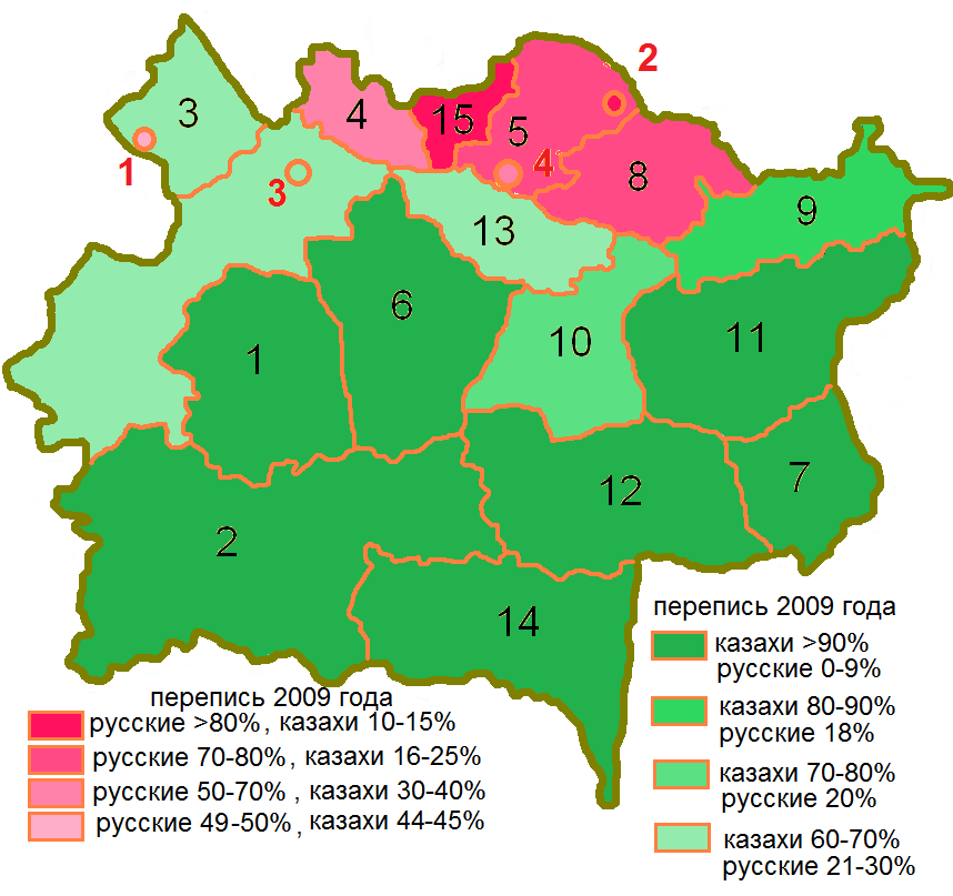 Этнический состав населения районов Восточно-Казахстанской области (русские и казахи) по переписи населения 2009 года